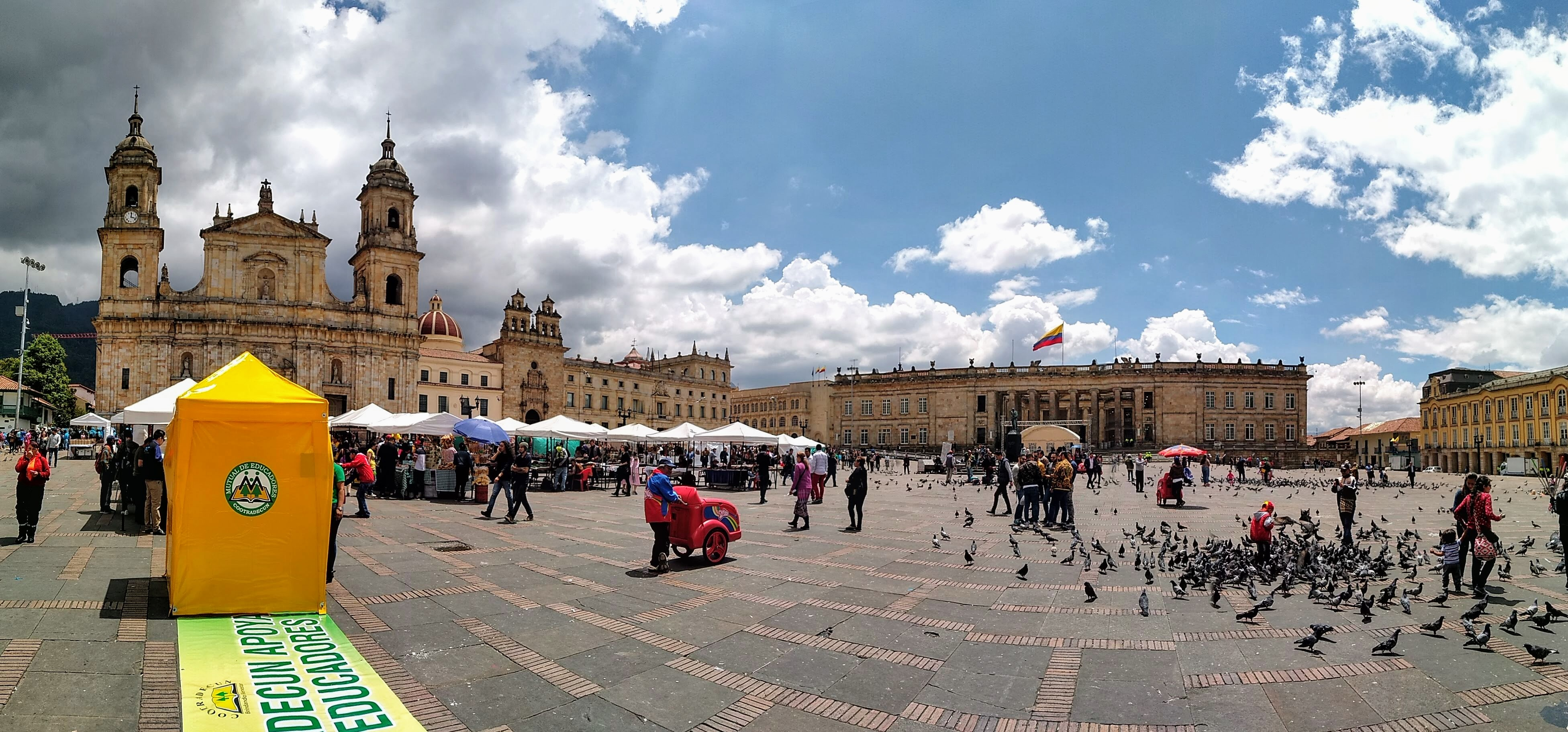 Panorámica de la Plaza de Bolívar en Bogotá (Colombia)